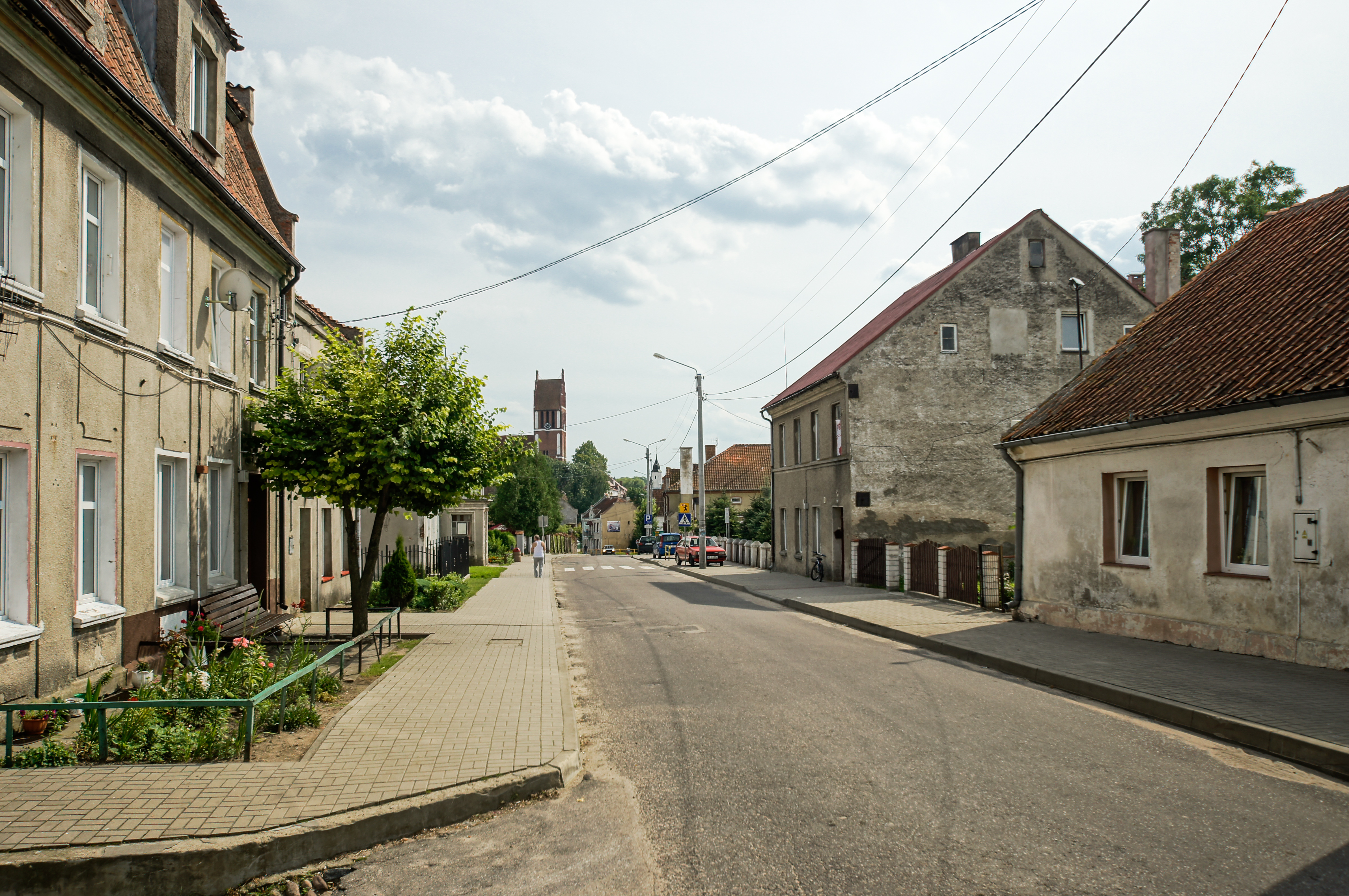 Ulica Mickiewicza w Jezioranach, w tle wieża kościoła św. Bartłomieja.